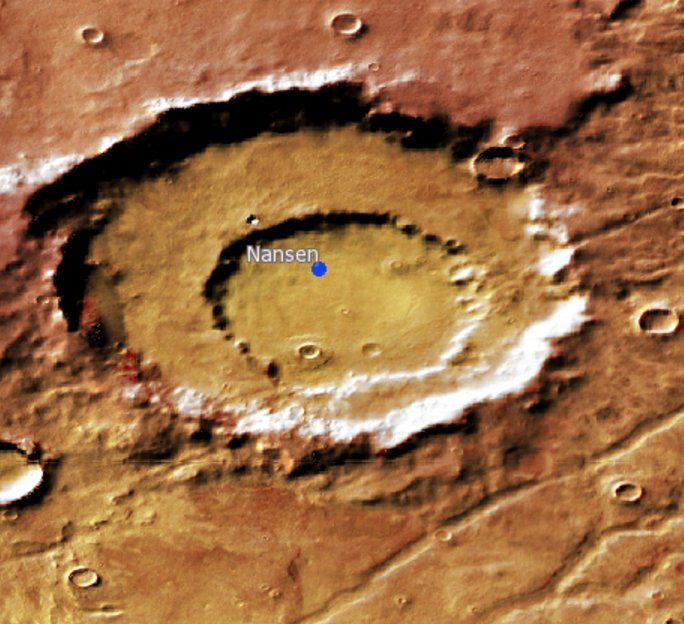 Cráter marciano Nansen. (Imagen IAU/USGS/Goddard/A SU/USGS)